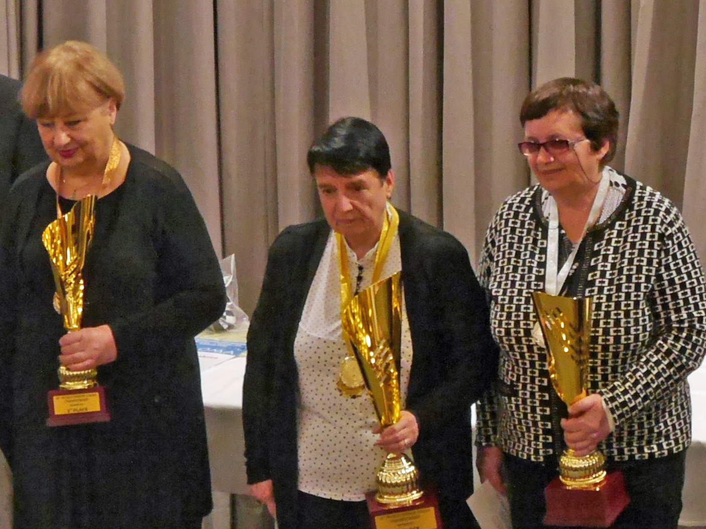 Siegerehrung der Frauen Ü65, Schachweltmeisterschaft der Senioren 2016 in Marienbad. Von links nach rechts: Tamar Khmiadashvili (3.), Nona Gaprindashvili (1.), Elena Fatalibekova (2.)